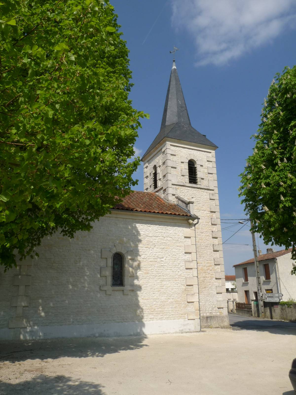 église de Fleurac, Charente, France